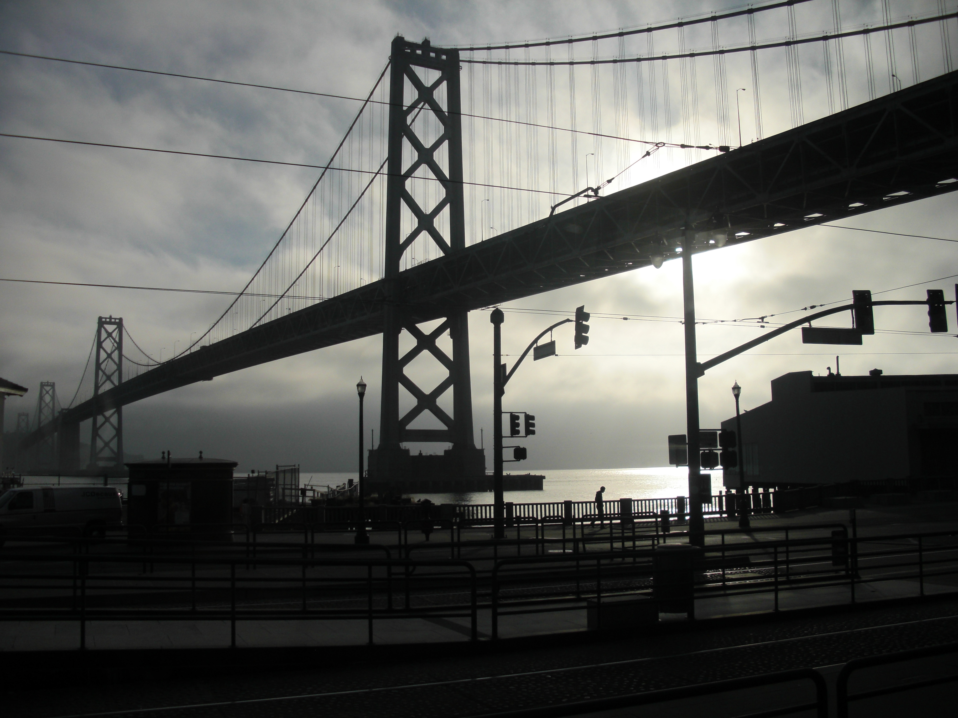 Cliché pris de San francisco à contre-jour.